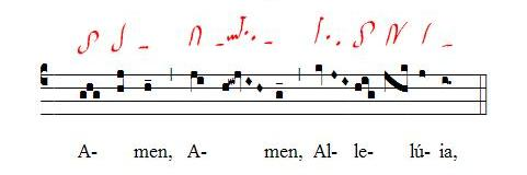 Voorbeeld neumen Gregoriaans